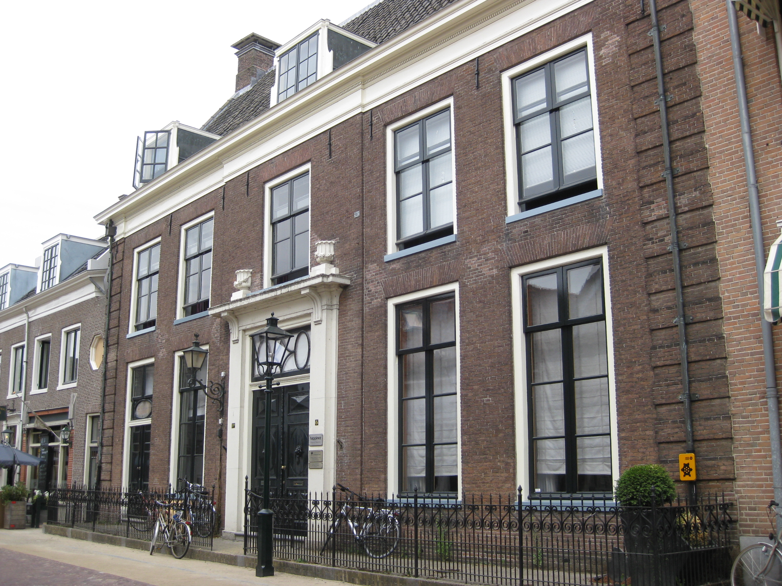 Rijksmonumenten Naarden Cattenhagestraat